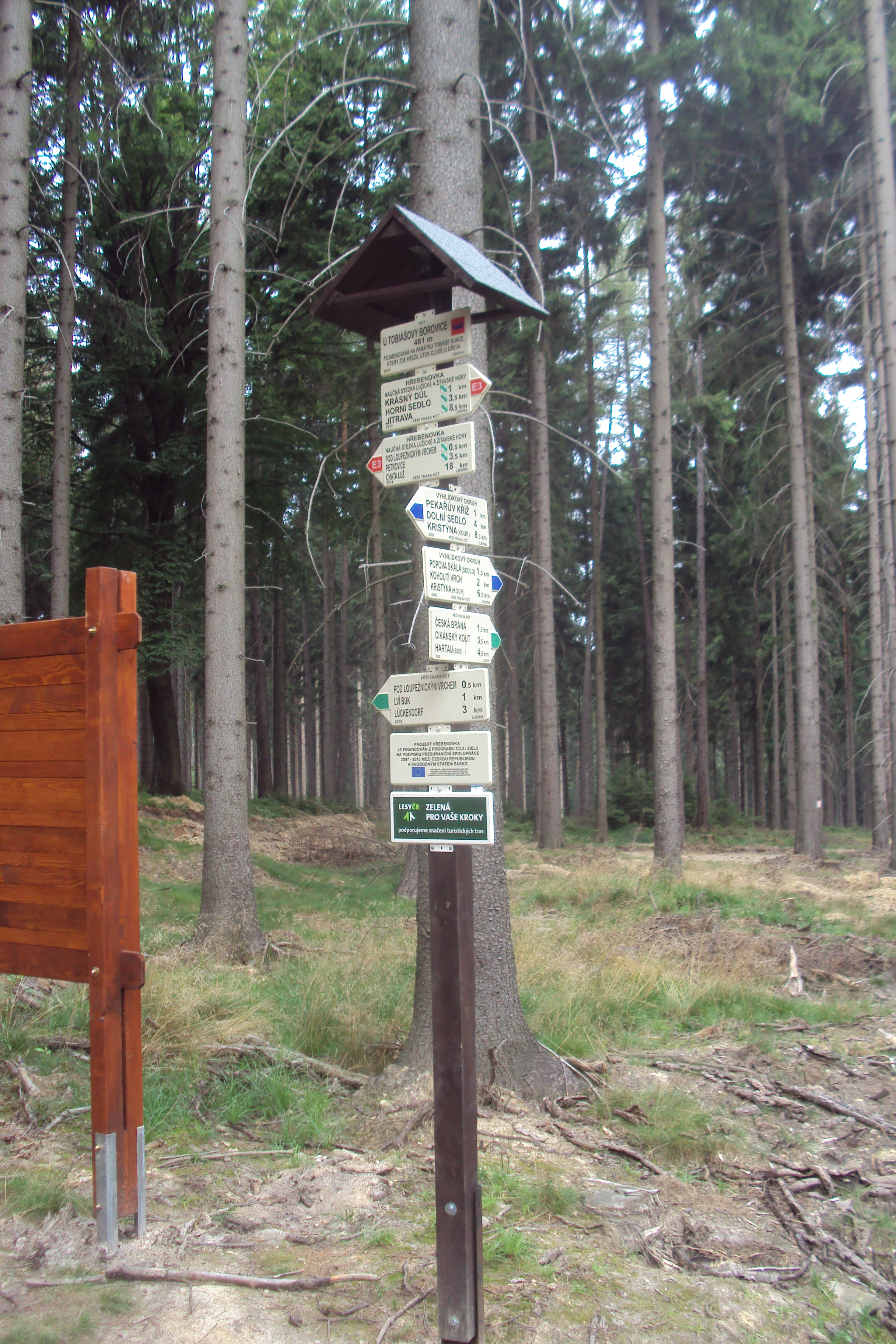 Rozcestník je na cestě k Hrádku nad Nisou v Lužických horách